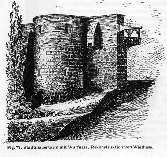 Kölner Stadtbefestigung des Mittelalters. Rekonstruktionszeichnung von Heinrich Wiethase aus dem 19. Jahrhundert